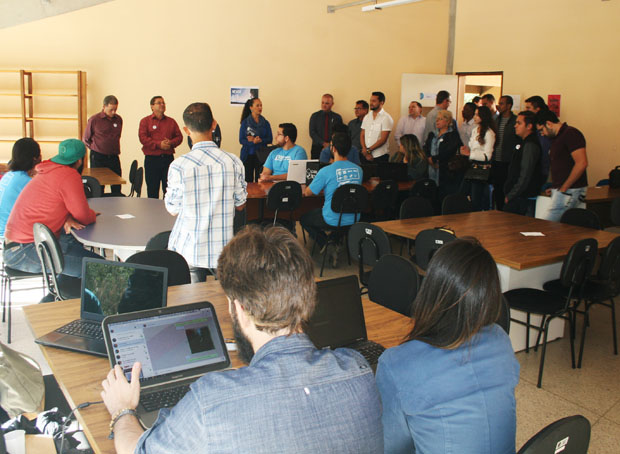 Imagem de uma das salas de trabalho do primeiro coworking público de Minas Gerais.